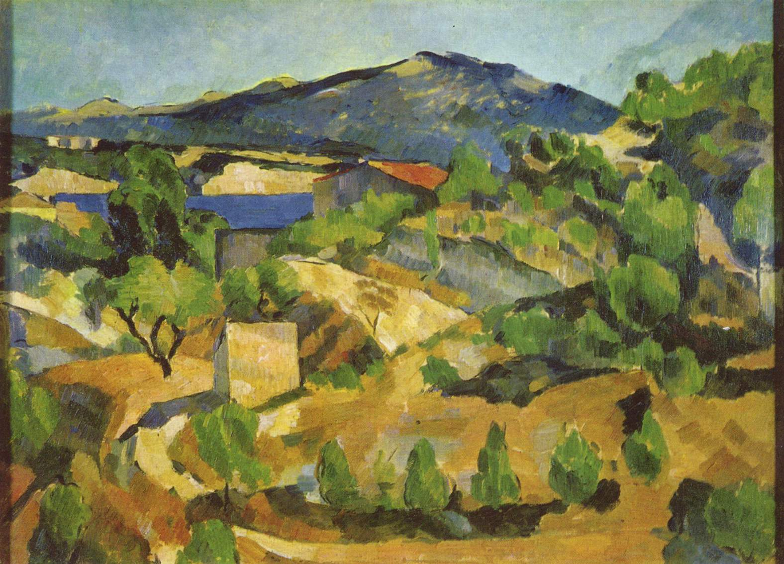 Berge in der französischen Provence